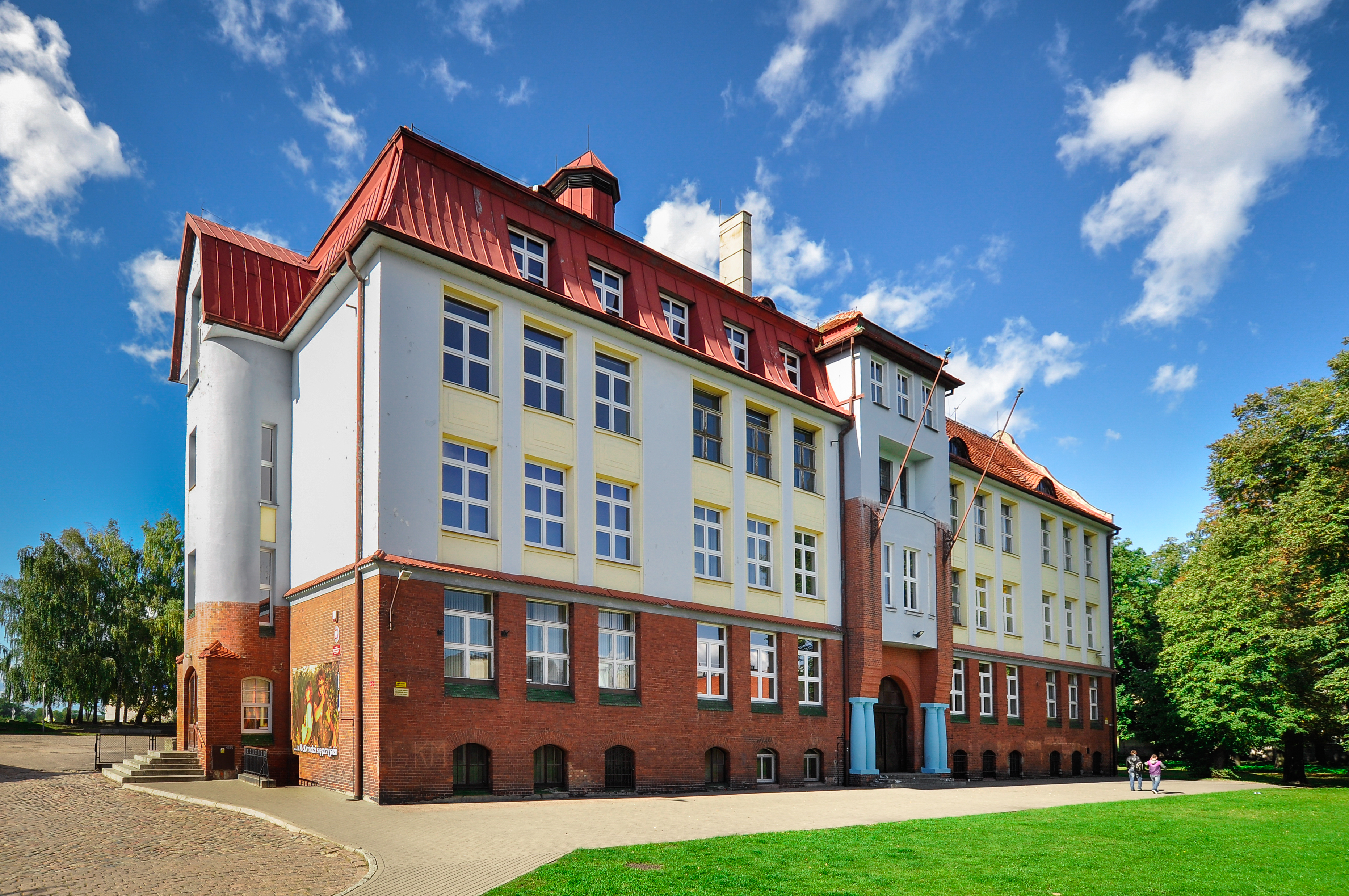 Budynek II Liceum Ogólnokształcącego im. Króla Jana III Sobieskiego w Grudziądzu